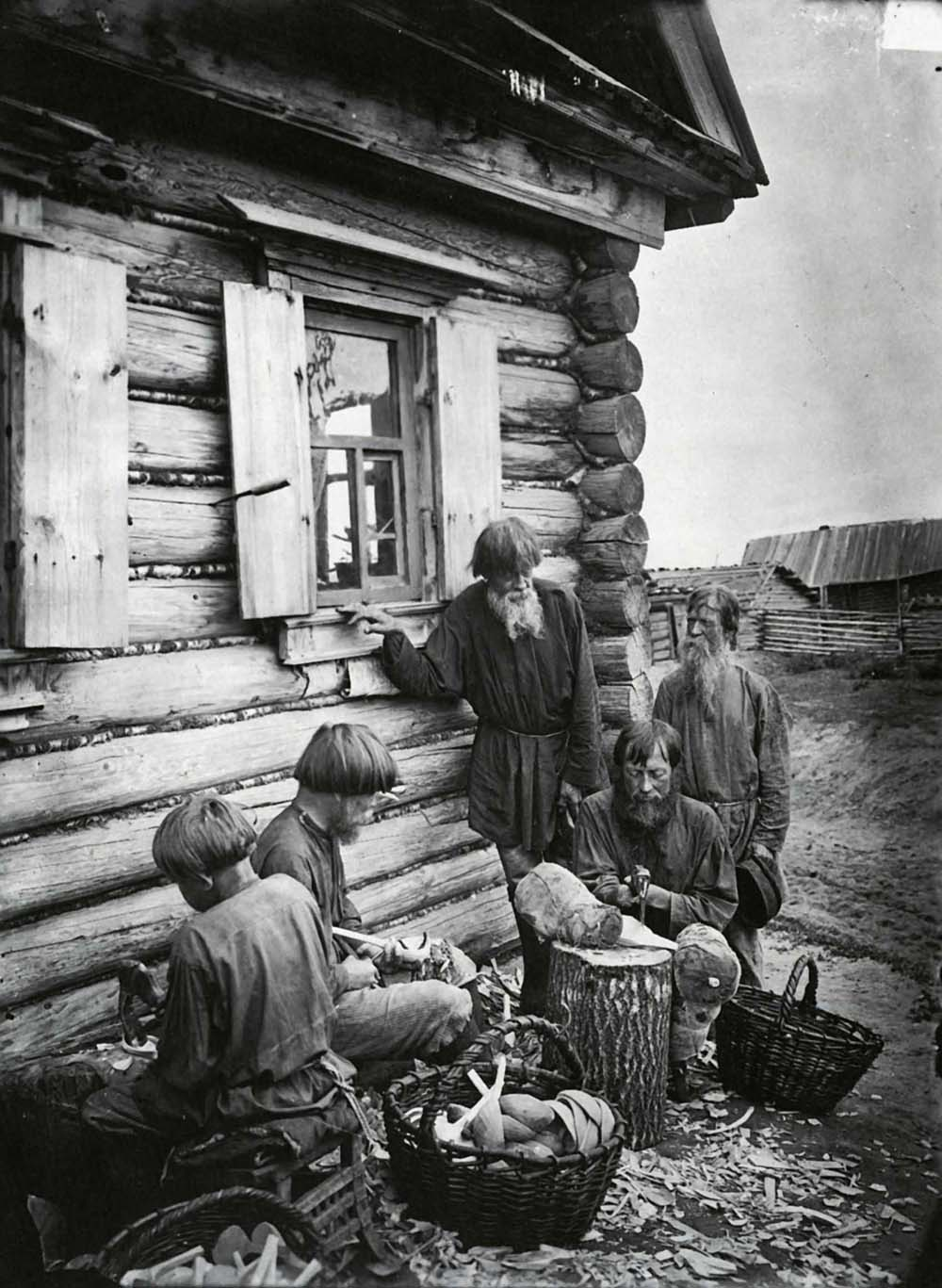 Ложкарное производство в деревне Деяново. Поволжье. Фото М.П. Дмитриева. 1897 г.